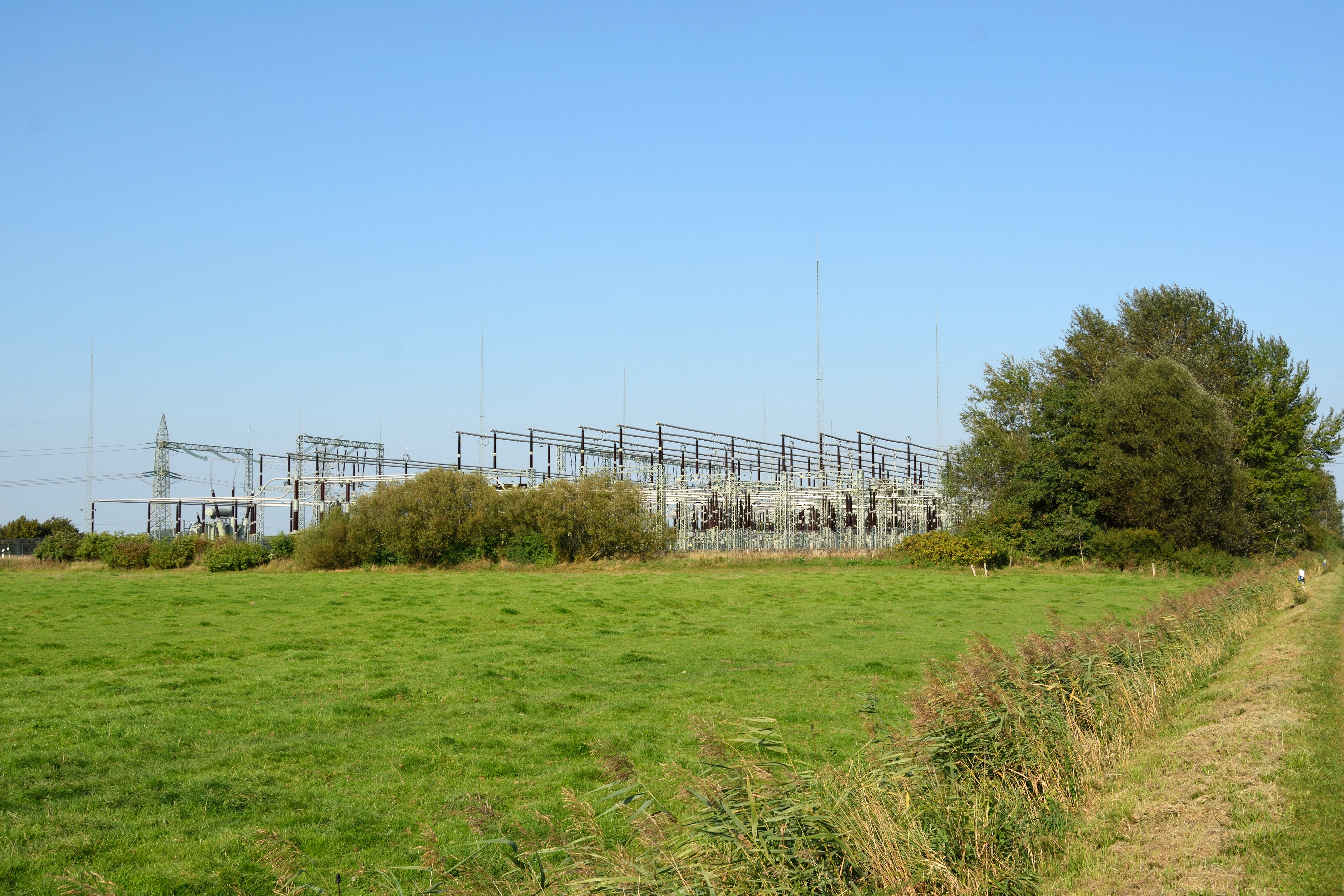 380-kV-Umspannwerk Wilster in Nortorf, Schleswig-Holstein